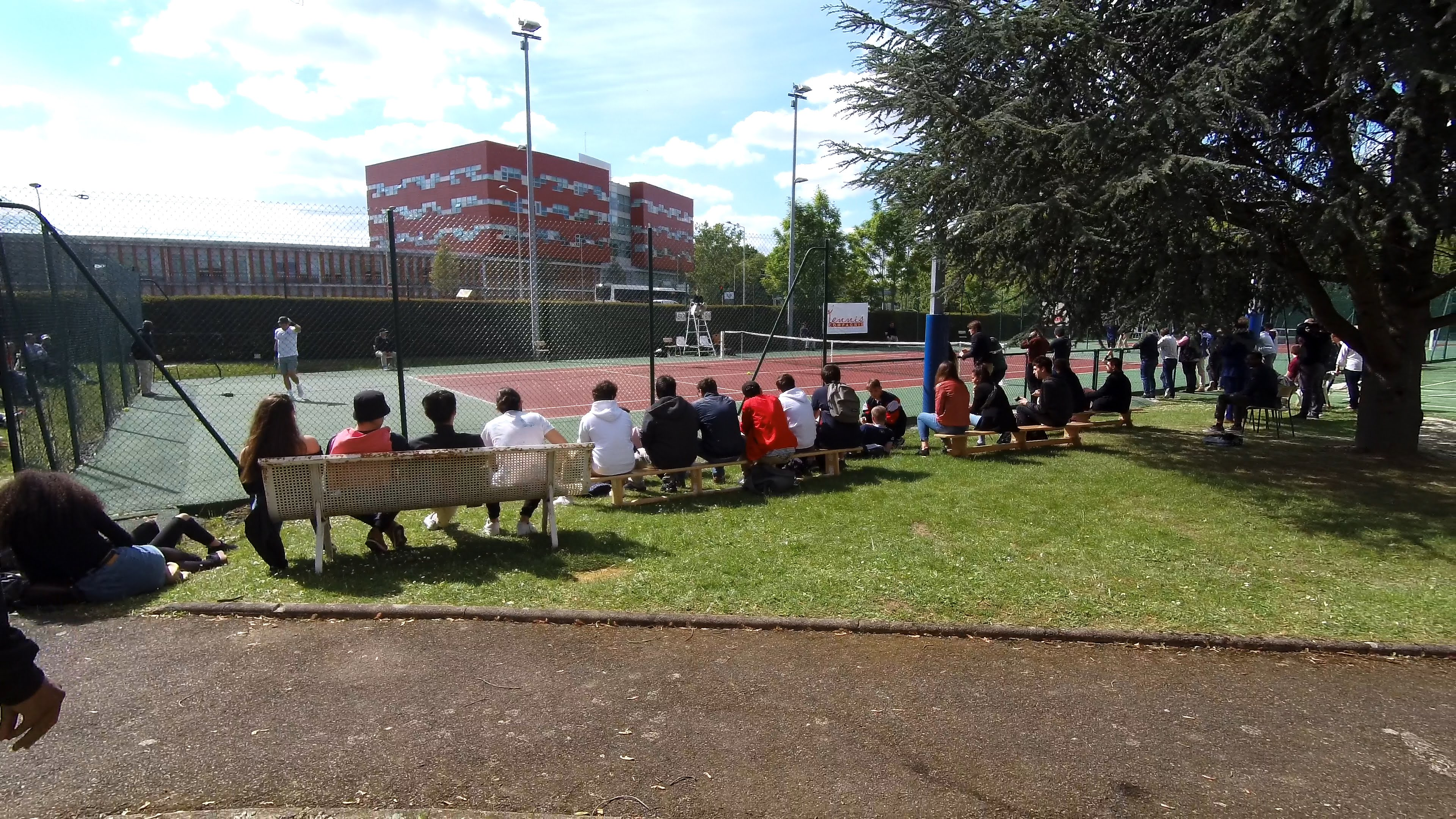 Une multitude d'activités sportives chez IMT-BS : tennis, beach volley, danse, badminton, tennis de table, salle de sport ...